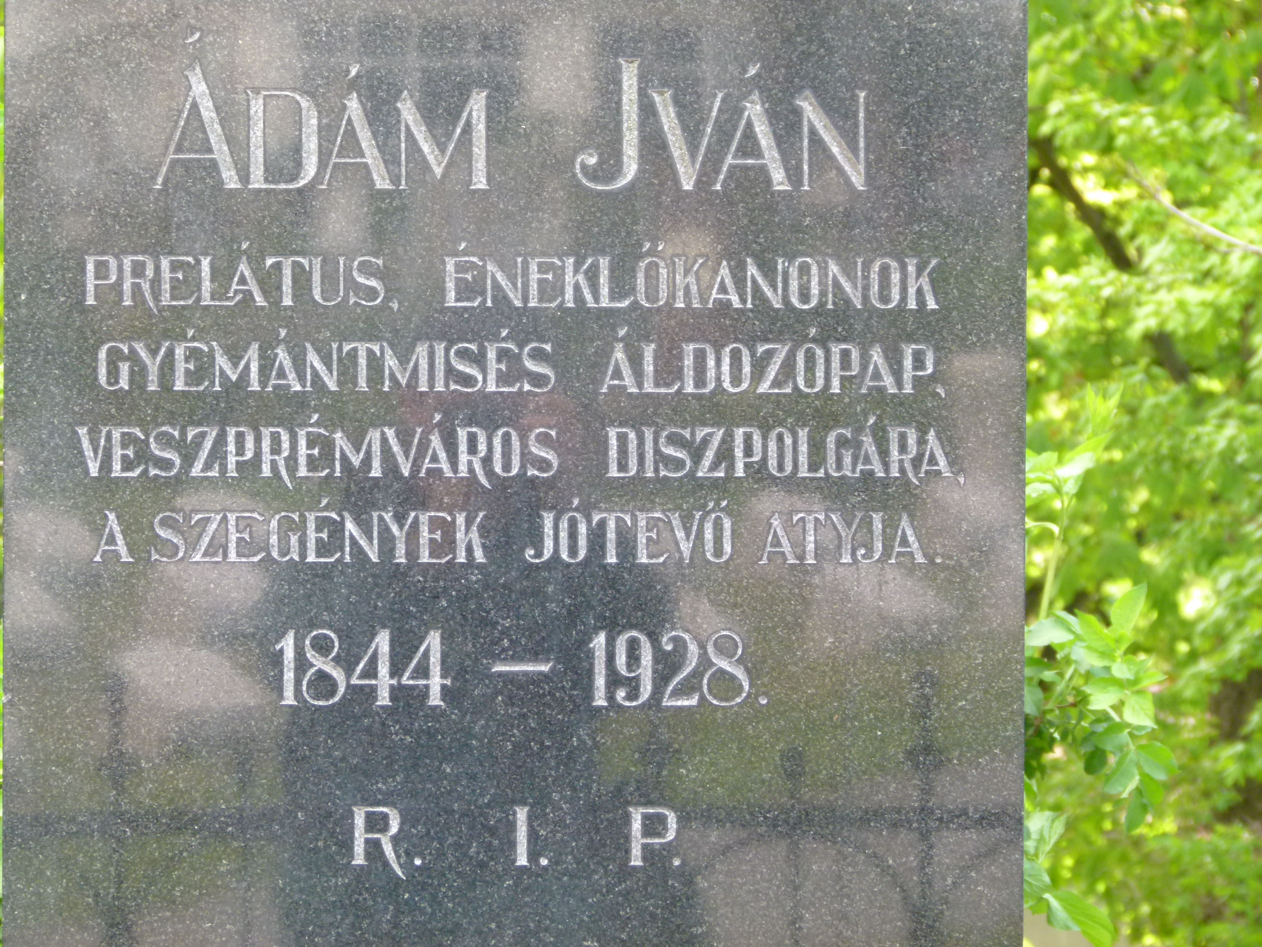 Ádám Iván (1844-1928), prelátus, kanonok, tanár sírja, Alsóvárosi temető, Veszprém